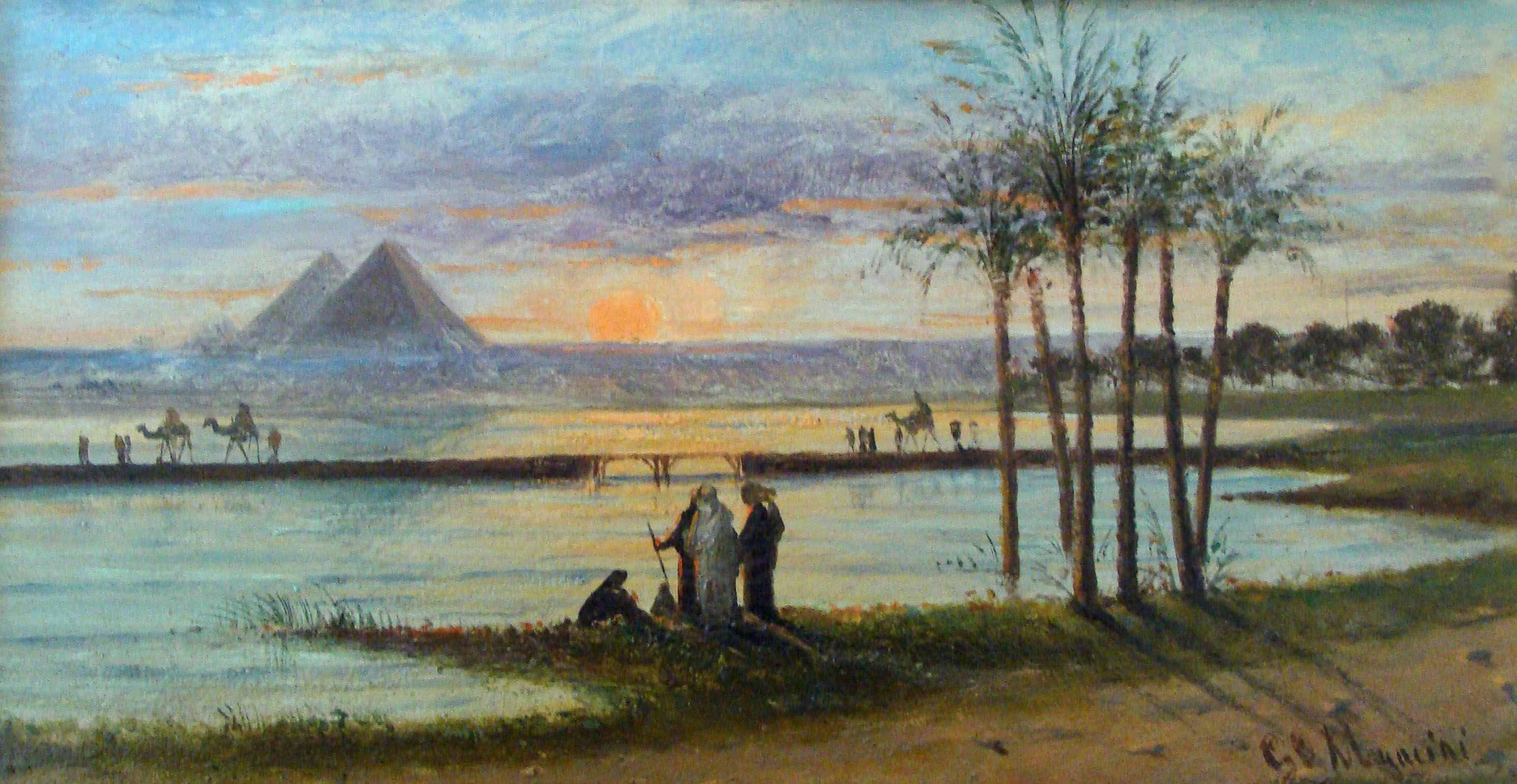 Coucher de soleil sur les pyramides d'Egypte (1875) Peinture à l'huile sur carton de Carlo Mancini (1829-1910)